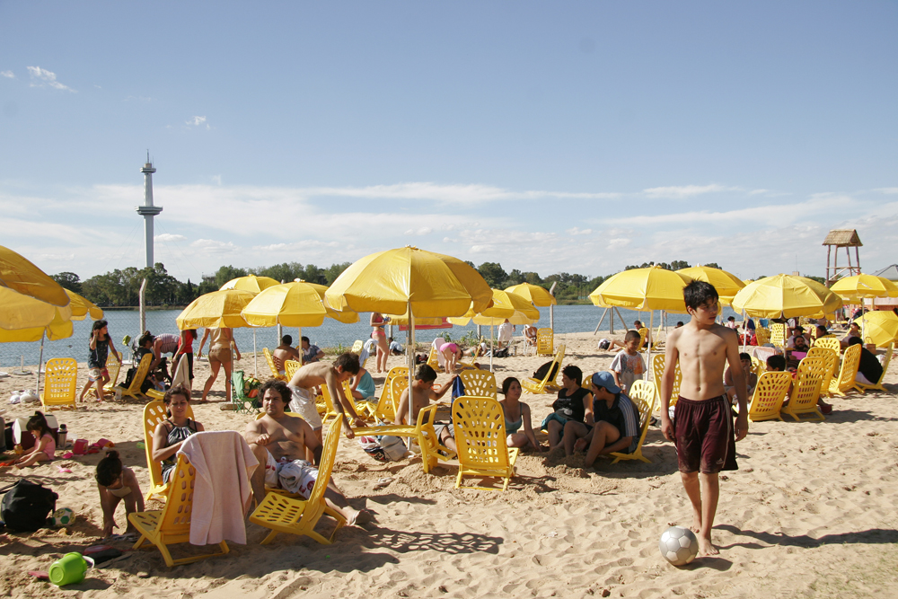 Fotos: Estrella Herrera